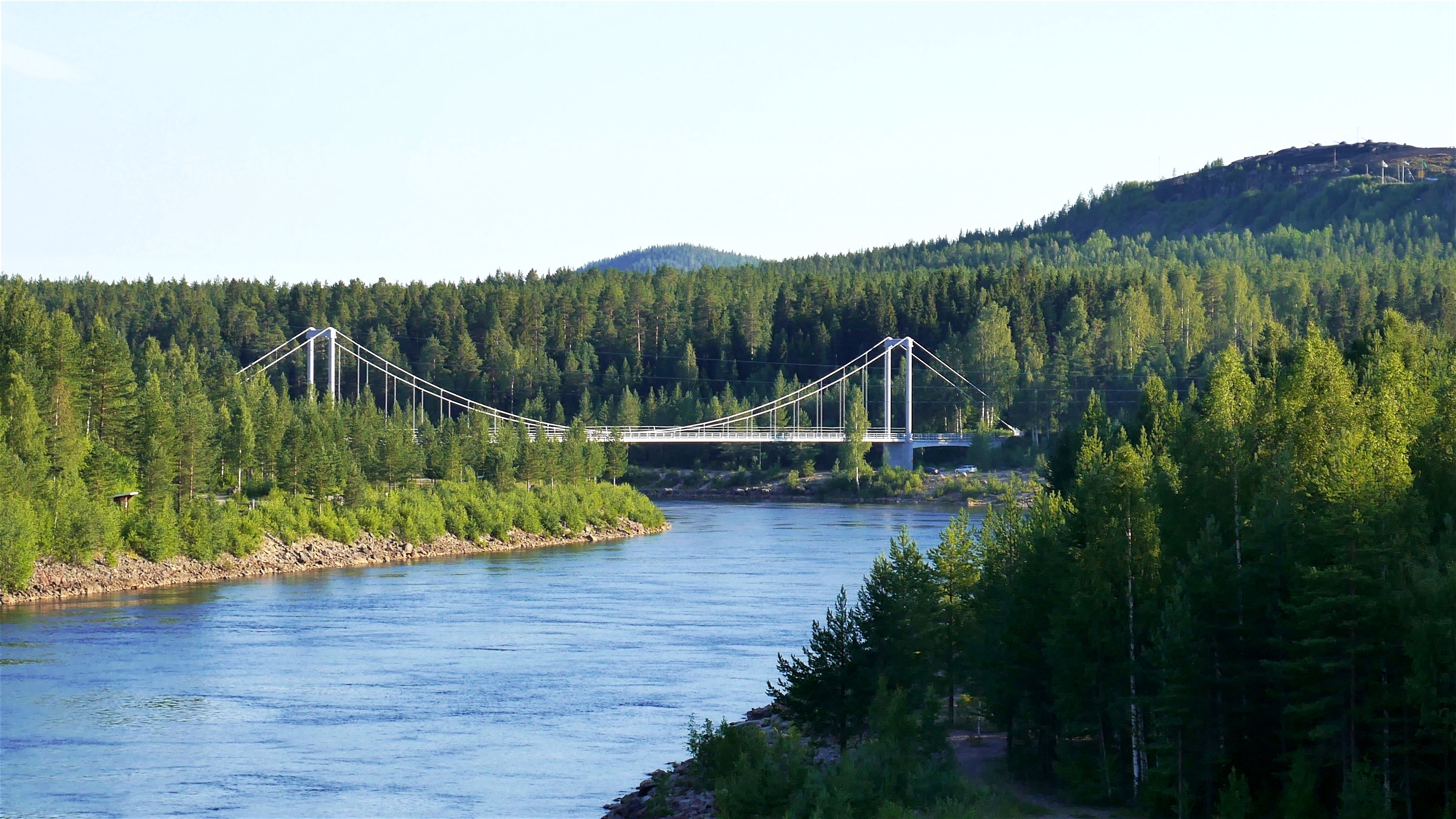 Svedjebron över Luleälven i Boden. Bron som är belägen strax nedströms Bodens kraftstation uppfördes 1941 och har en längd på 198 meter och är 4 meter bred. Till höger bakom bron syns Rödbergsfortet.